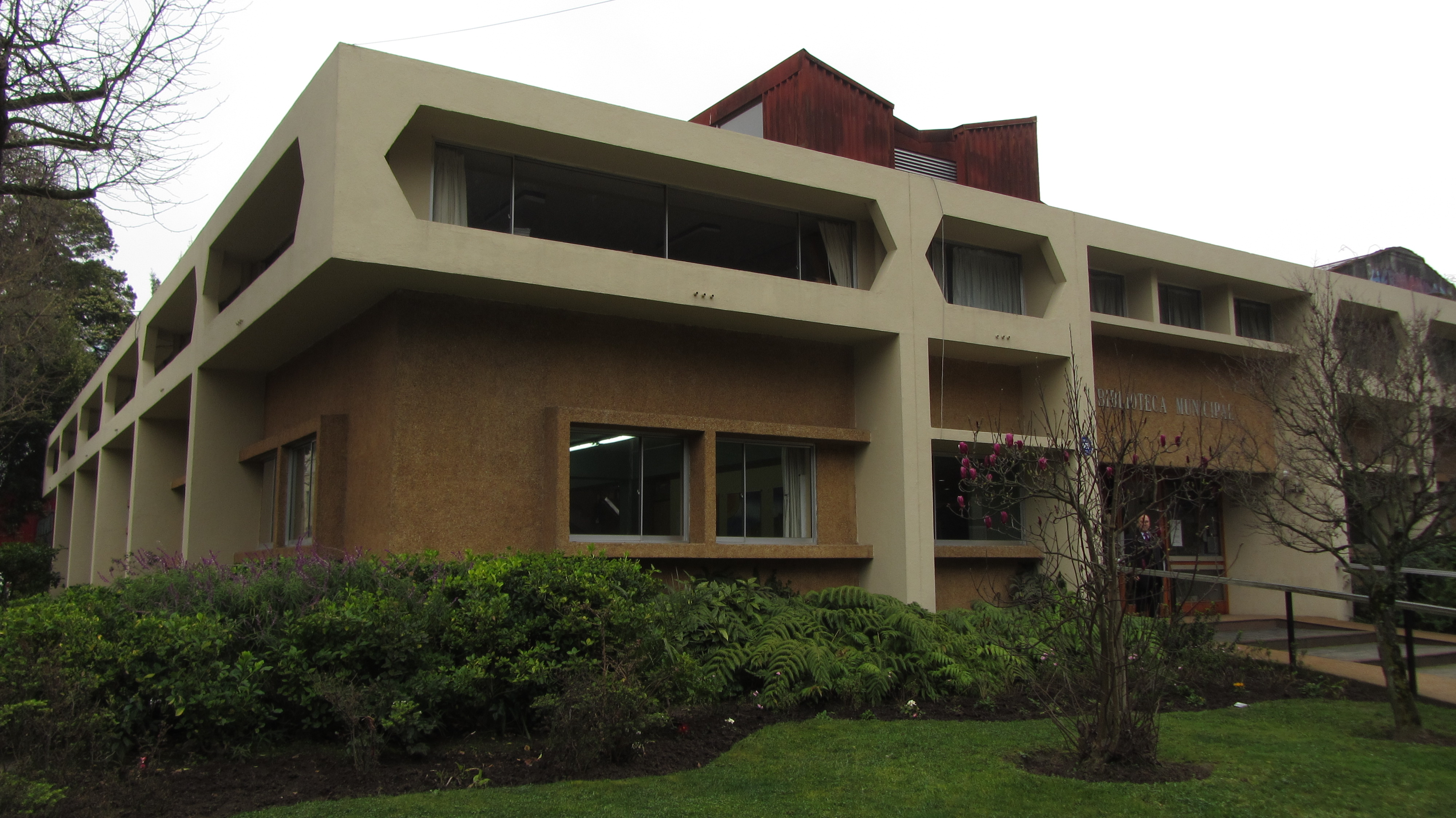 Biblioteca Municipal de Concepción Concepción, Chile Septiembre de 2012